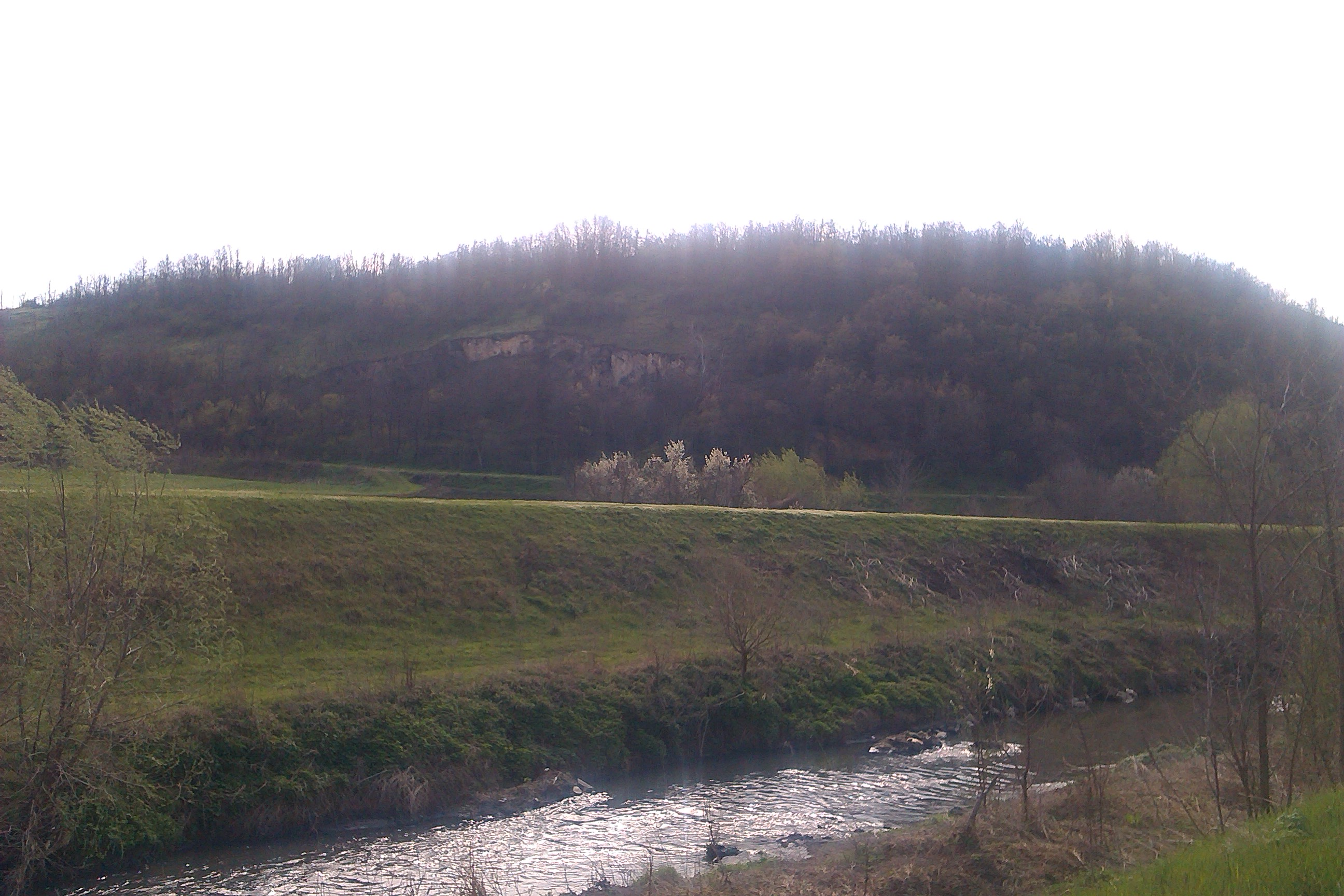 Srpski (latinica): Pogled na Jerinino Brdo u Gradcu